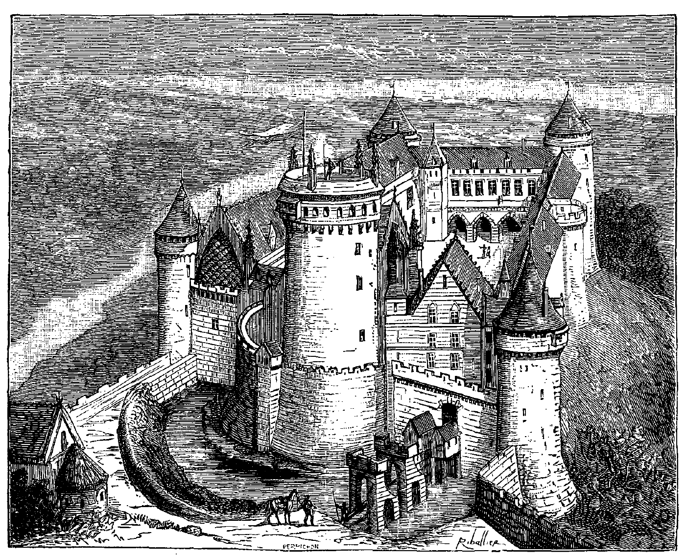 extrait de La France illustrée, géographie, histoire, administration, statistique, etc., tome I, par V.-A. Malte-Brun.